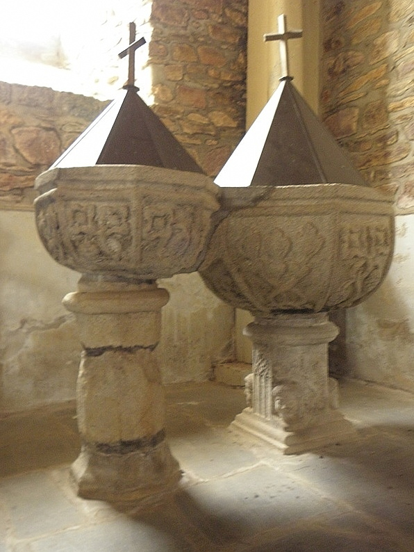 Fonts baptismaux de l'église Saint-Pierre de Pleumeleuc (35).